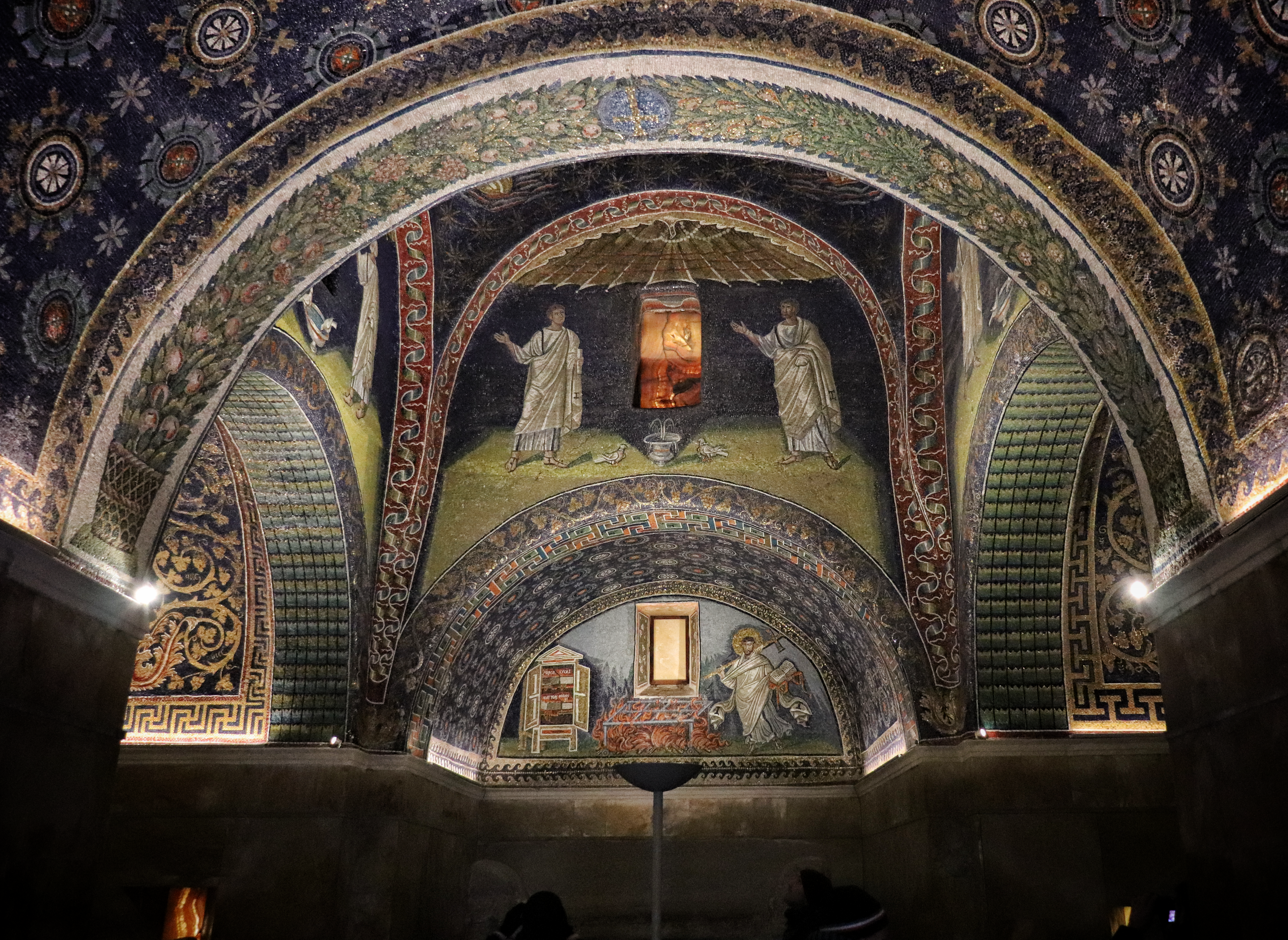 Mausoleo di Galla Placidia This is a photo of a monument which is part of cultural heritage of Italy.